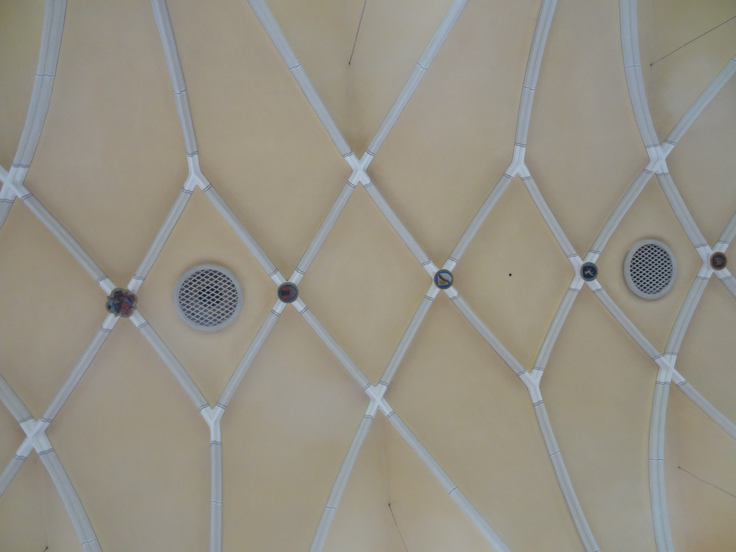 Rippengewölbe im Kirchenschiff der Pfarrkirche St. Kastulus in Vilsheim (Lkr. Landshut, Bayern)